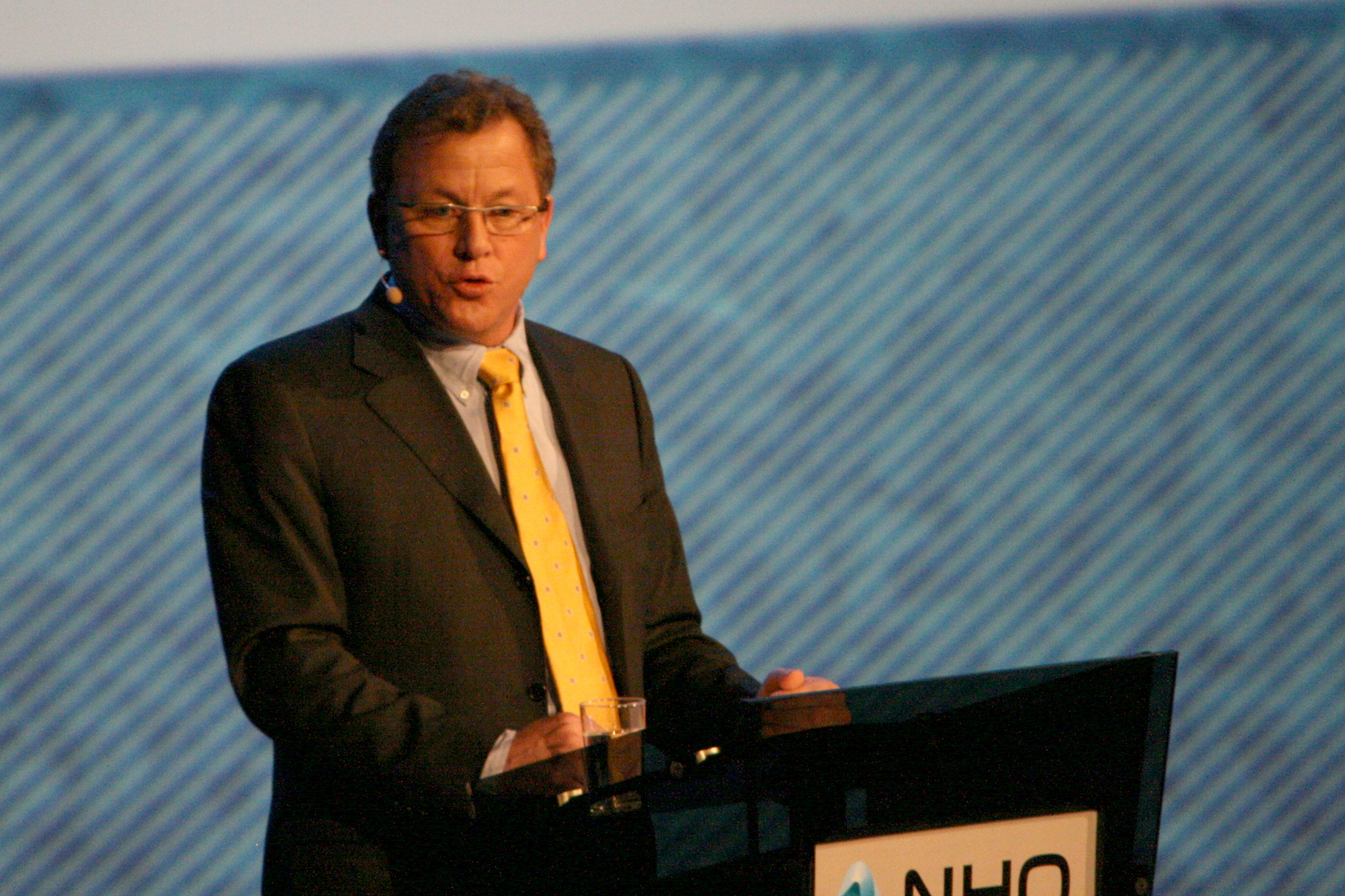 John G. Bernander, Høyrepolitiker og kringkastingssjef. Fra NHOs Årskonferanse 2009.